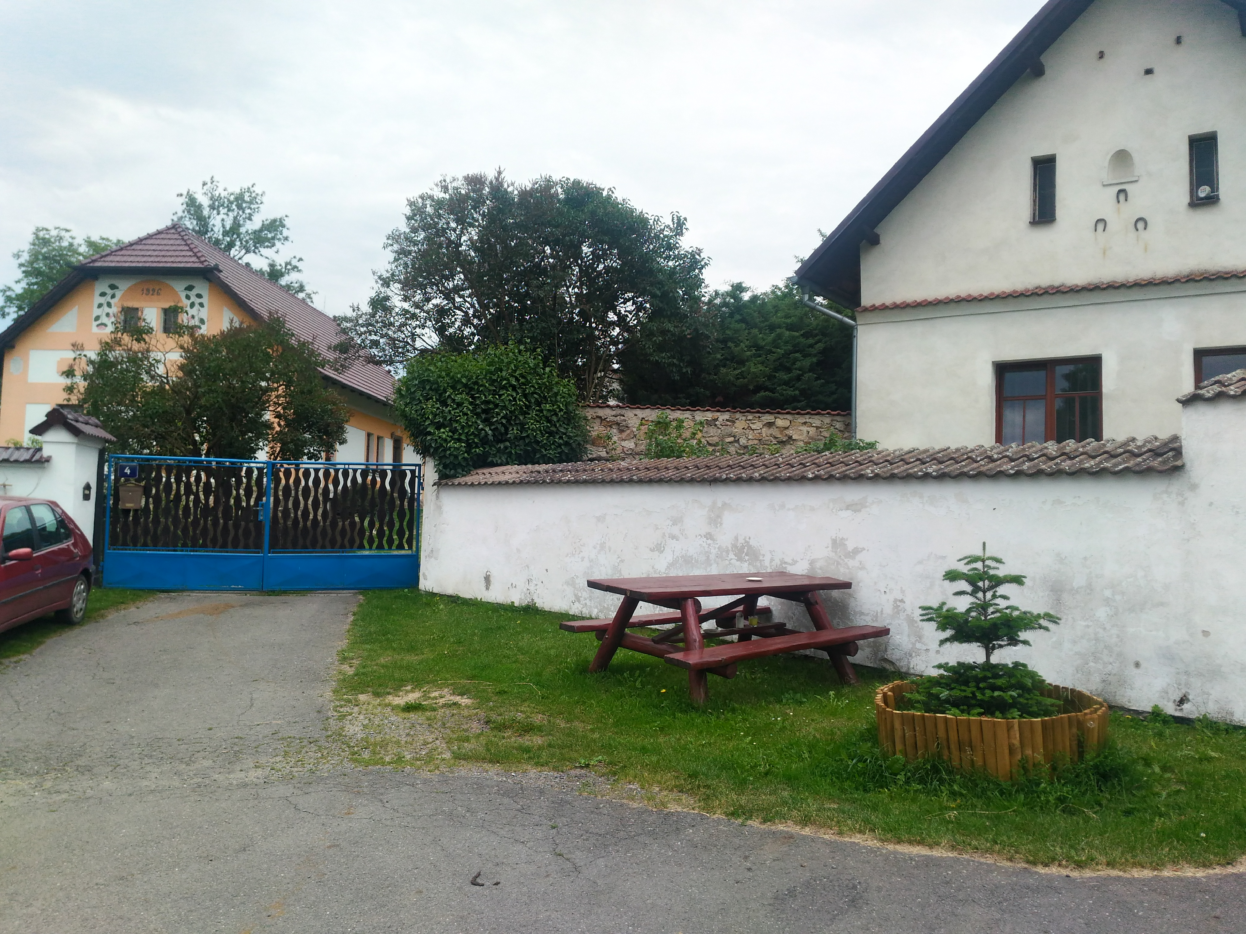 Orlov, okres Tábor, Česká republika